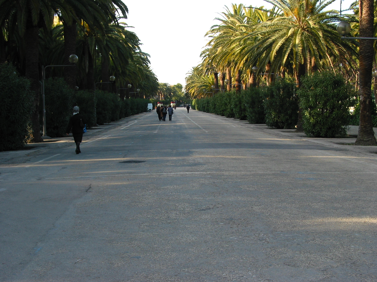 viale Buozzi. S. Benedetto - Viale Buozzi.